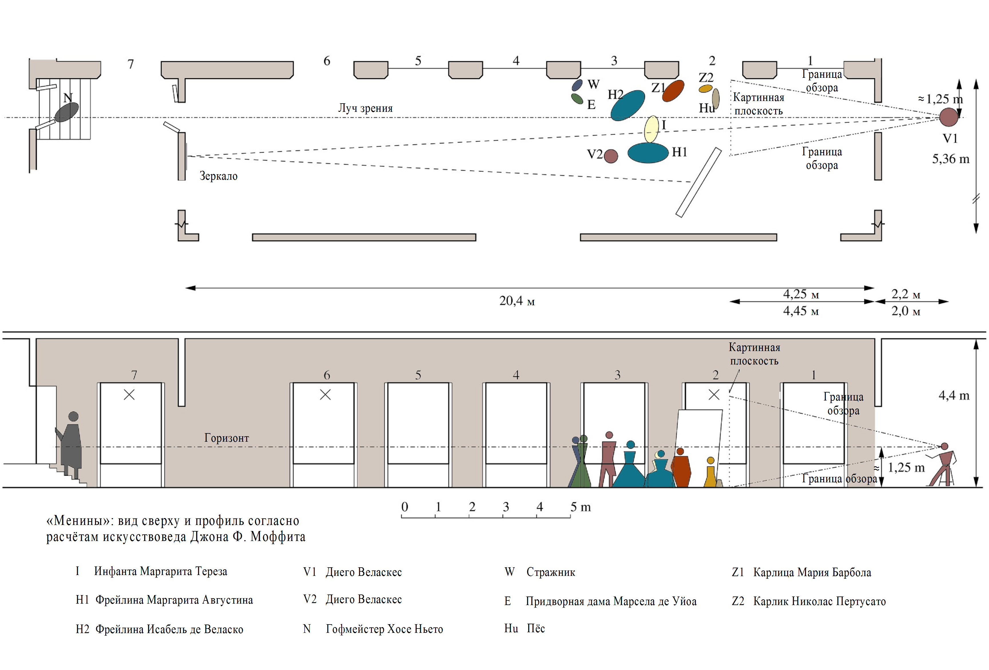 Перевод на русский изображение пользователя Prof.SpongeBob из немецкой Википедии